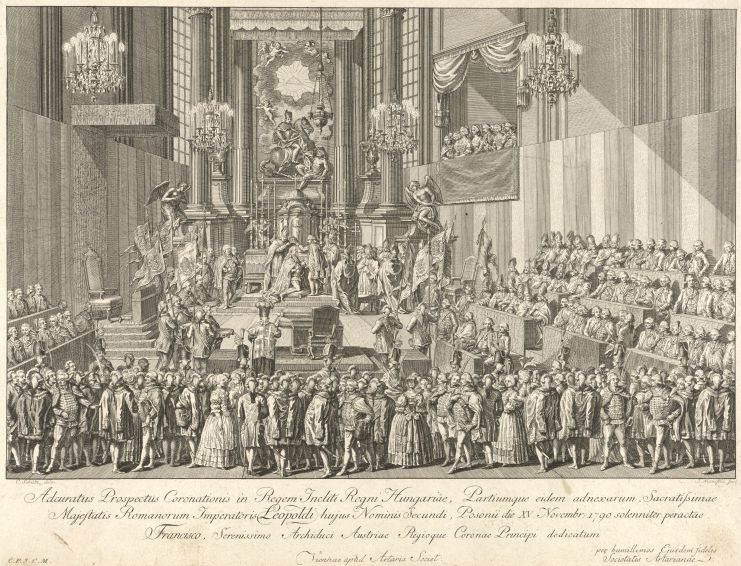 II. Lipót koronázása (1790)